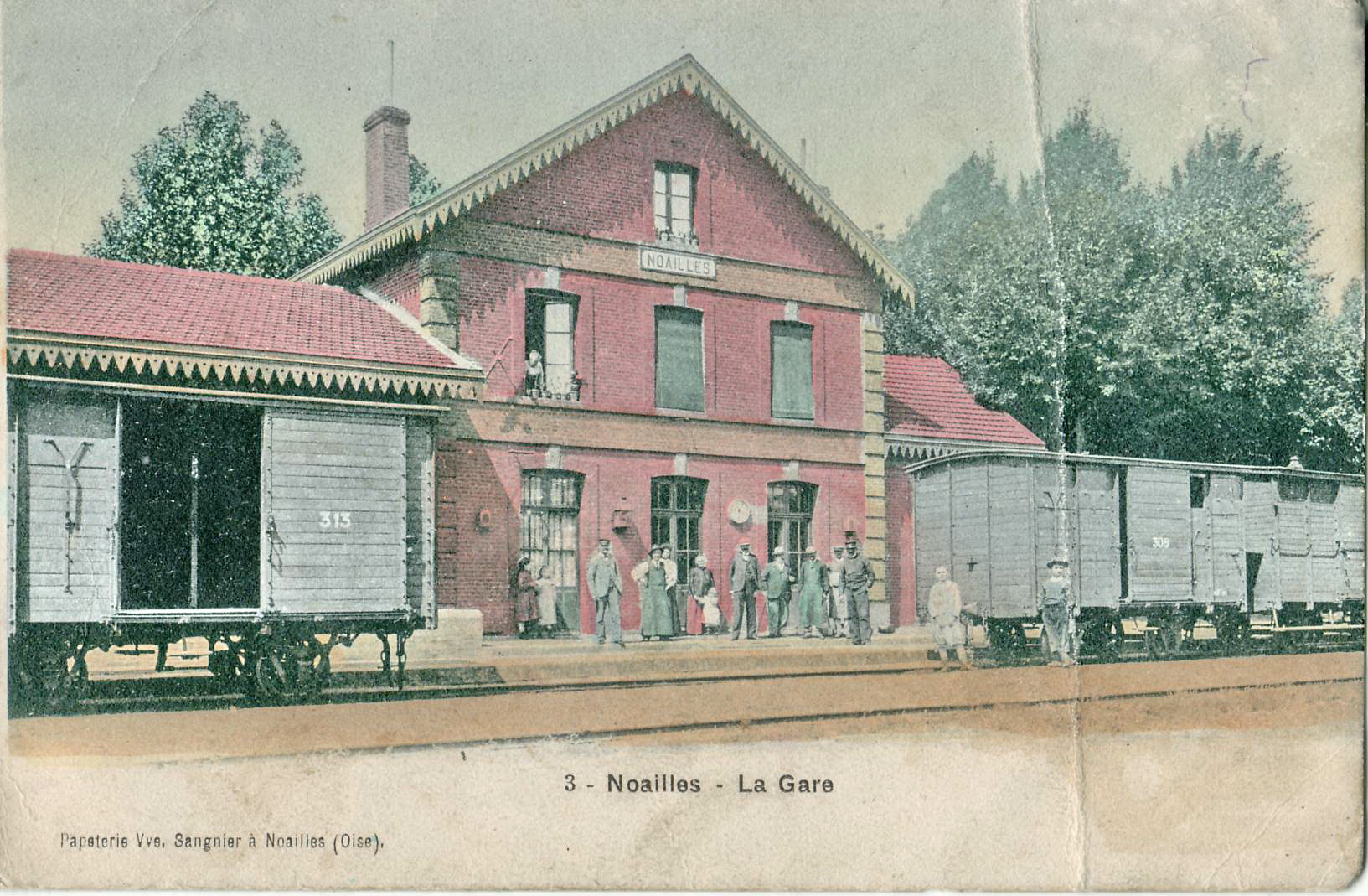 Carte postale ancienne éditée par Sangnier à Noailles - N°3Noailles (Oise) - La GareLigne de chemin de fer secondaire d'Hermes à Beaumont (Oise)